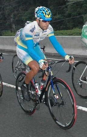 Rodrigo García (Euskal Bizikleta 2007)